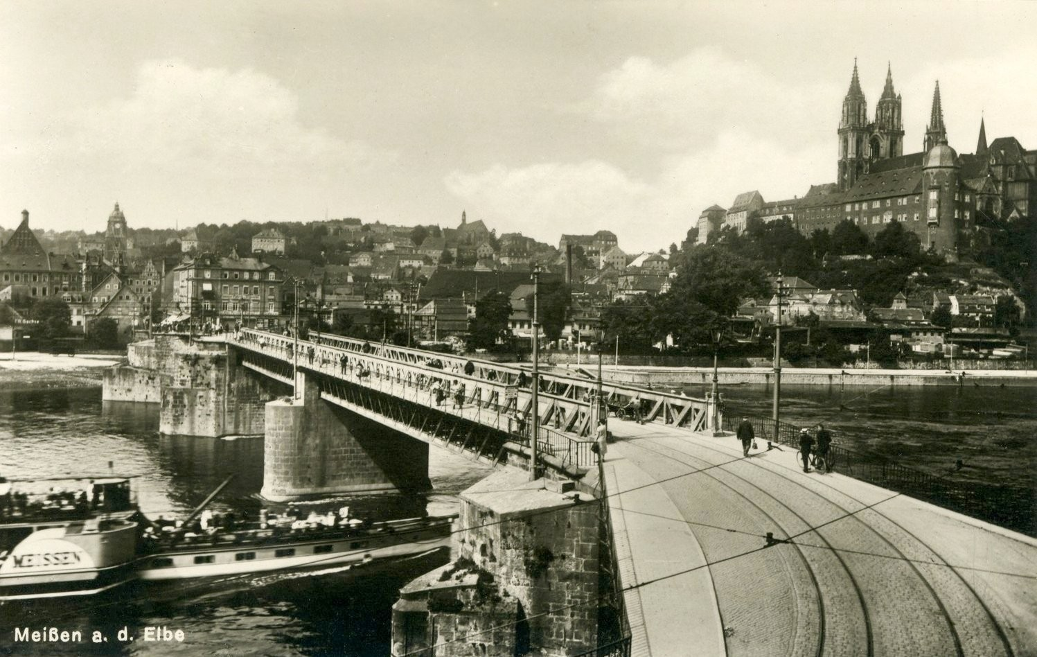 Meißen; Albrechtsburg und Dom, Brücke, Dampfer Meißen This postcard is from publisher Brück & Sohn in Meißen ( postcard has a unique number 23578 and is available in a higher resolution at the publisher. This images was uploaded in a cooperation project between Wikipedians and the publisher.